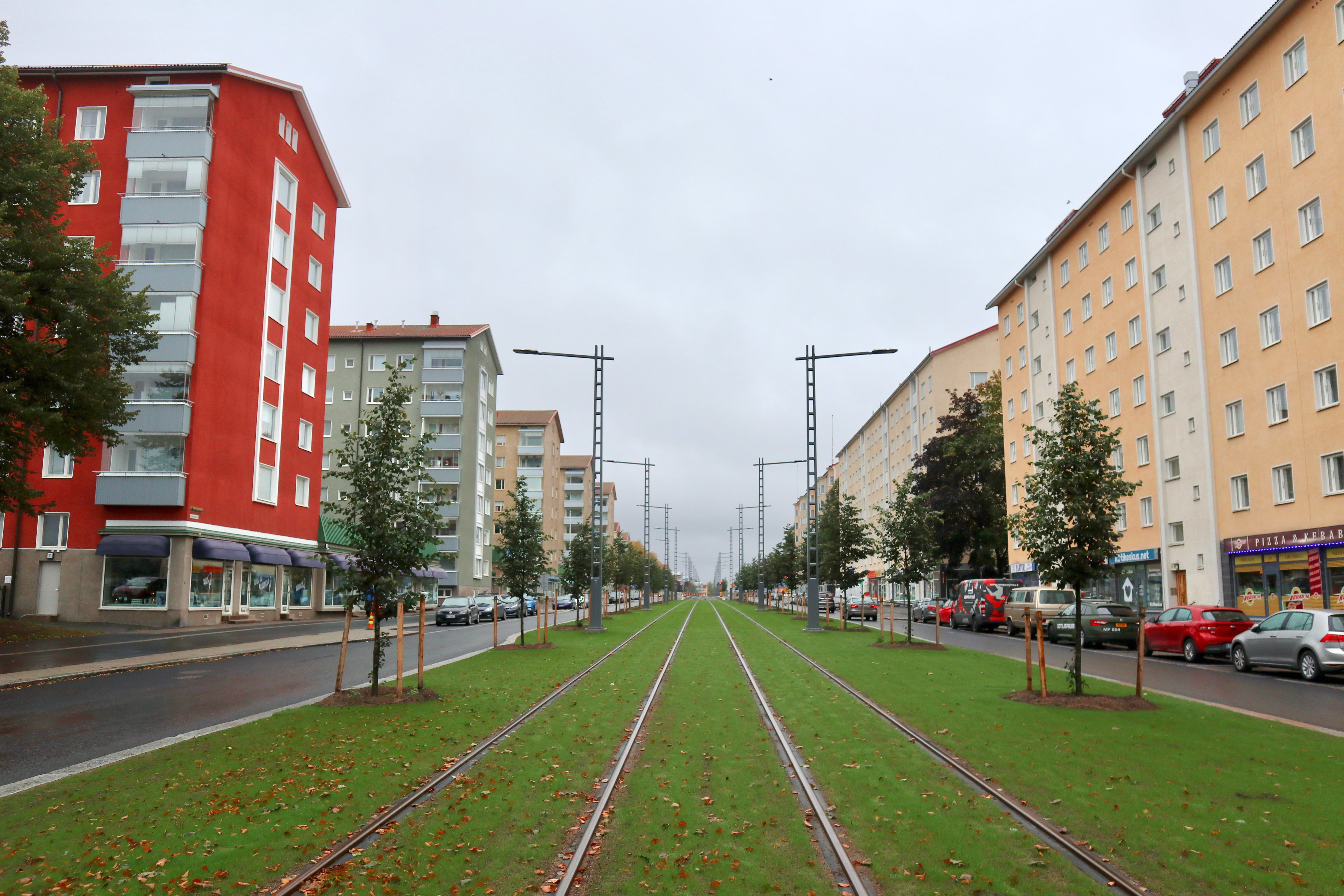 Kaleva